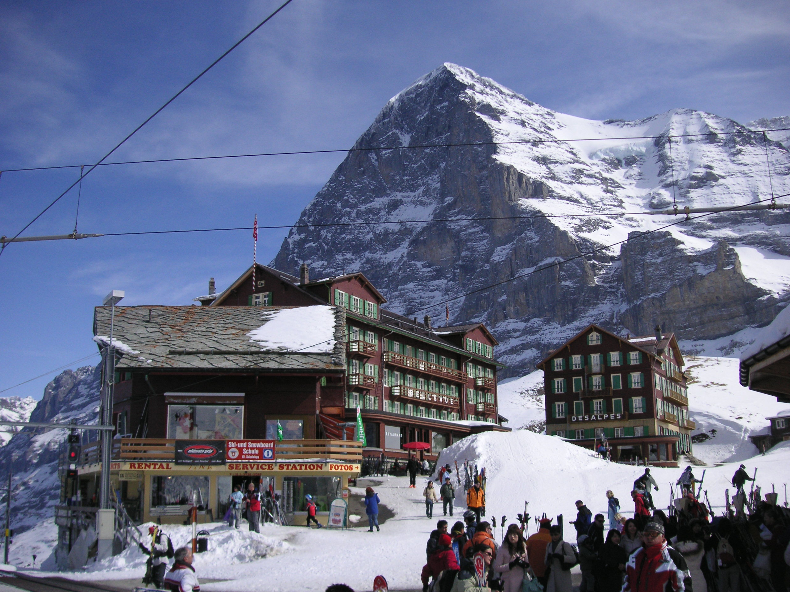 Kleine Scheidegg mit Eigernordwand